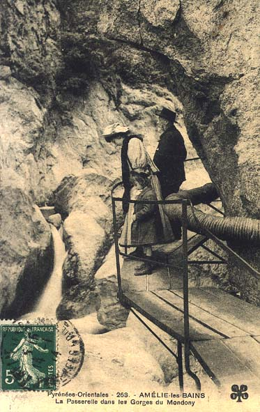 Gorges de Mondonyren argazki zaharra postal batean.